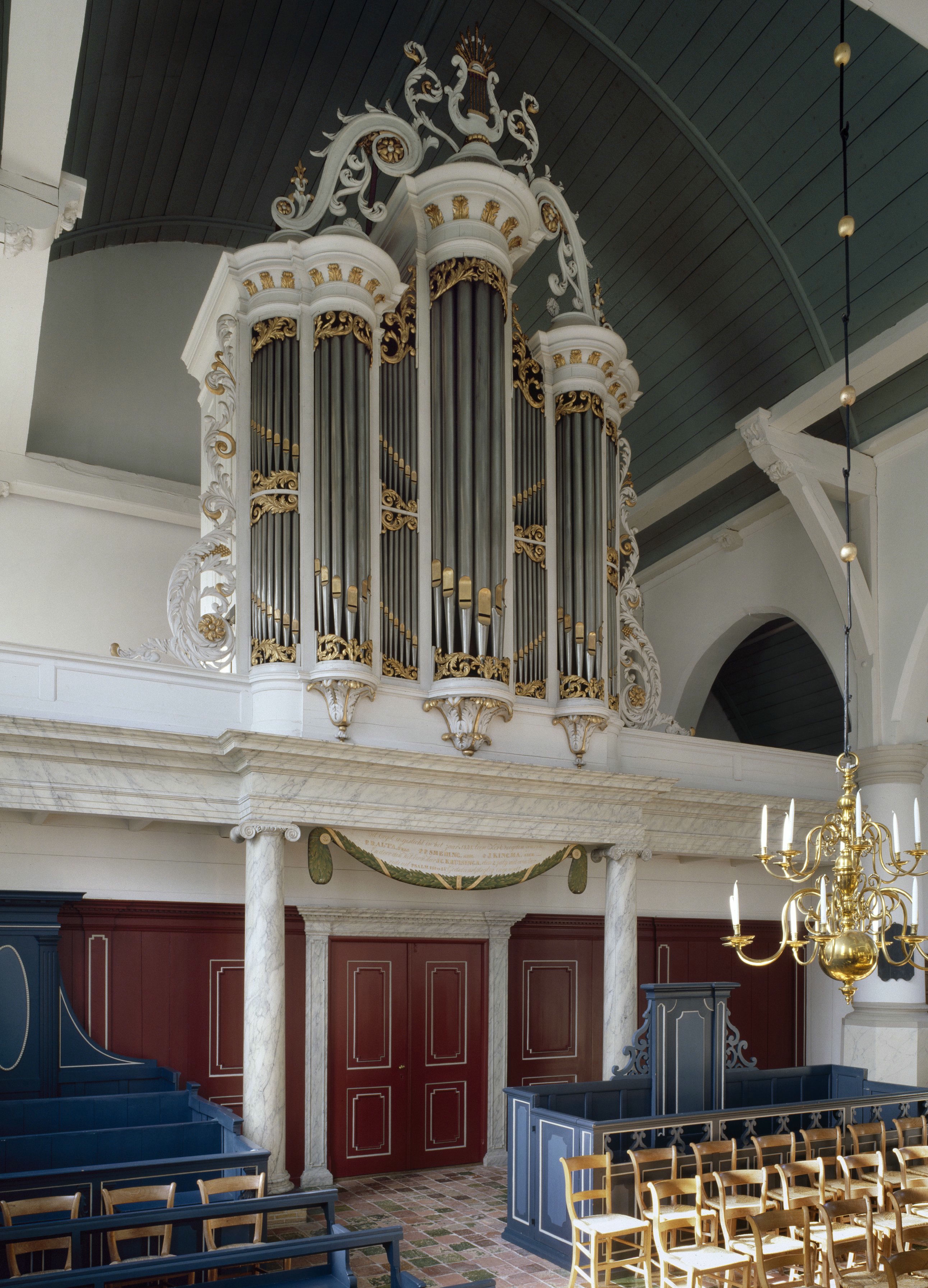 Nederlands Hervormde Kerk: Interieur, aanzicht orgel, orgelnummer 936 (opmerking: Gefotografeerd voor Het Historische Orgel in Nederland 1840-1849, bladzijde 339)